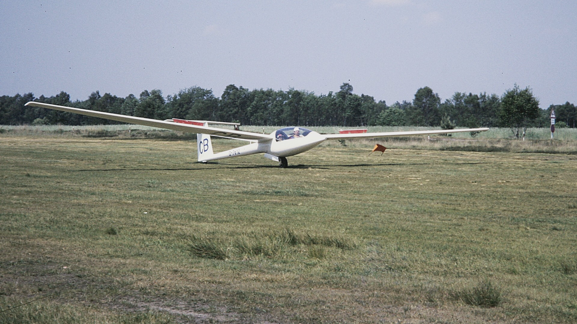 B12 der Akademischen Fliegergruppe Berlin bei der Landung